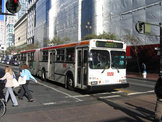 Автобус на МЮНИ на улица Маркет в Сан Франциско, щата Калифорния, САЩ. (авторска снимка)